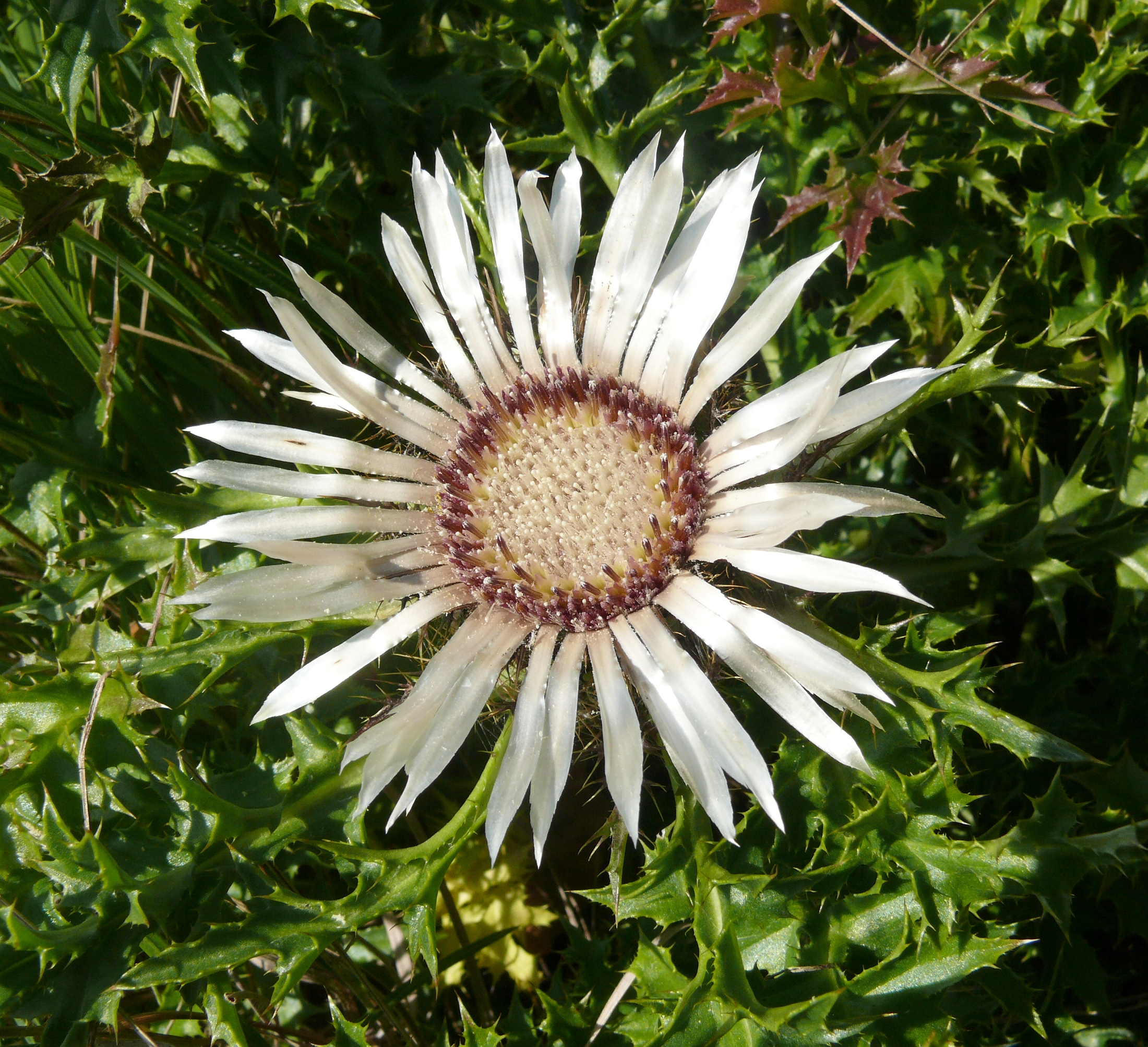 Carlina acaulis, Schwäbische Alb, Germany